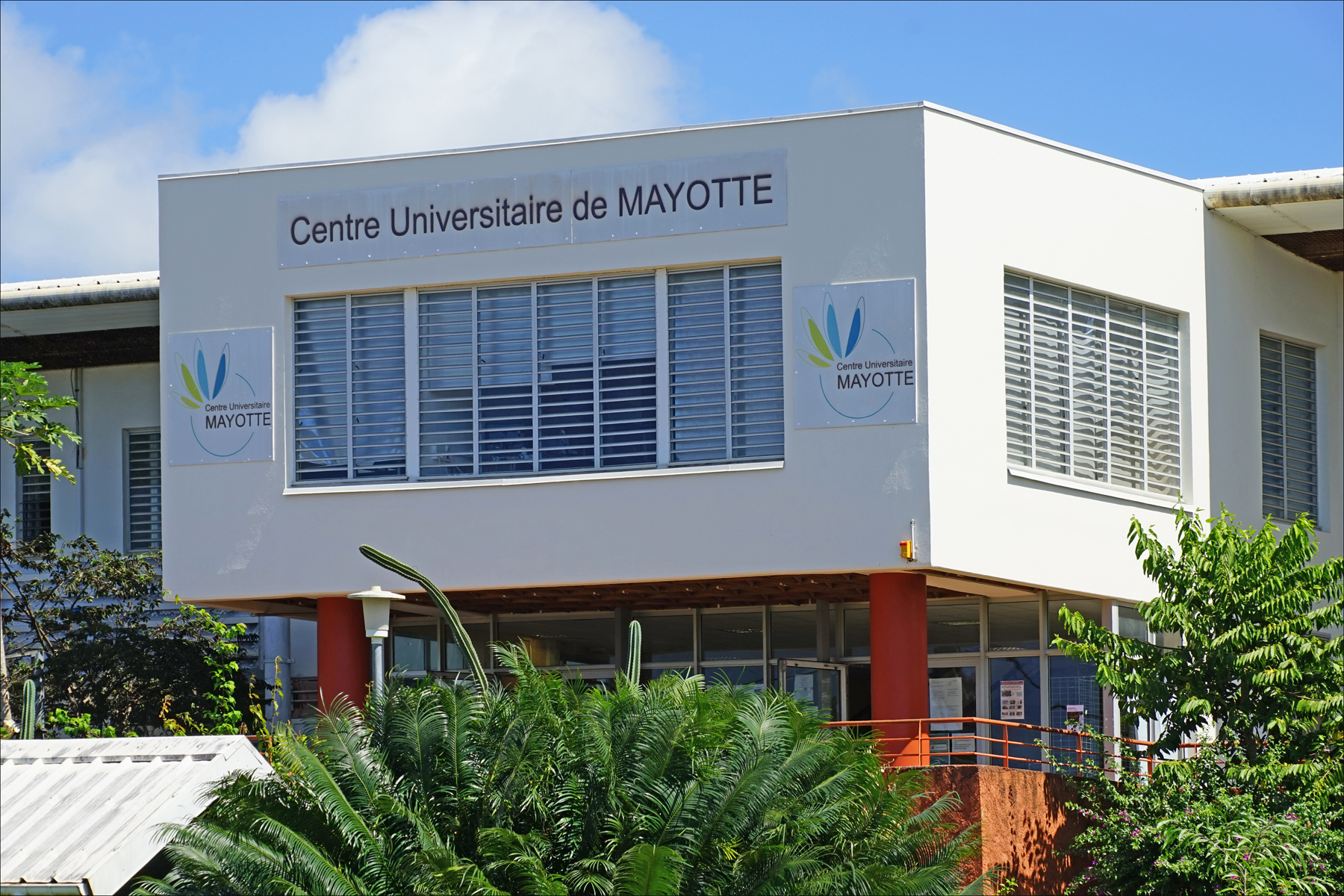 Le Centre universitaire de Mayotte est un établissement public d'enseignement supérieur, il a été créé en 2011 (décret no 2011-1299 modifié du 12 octobre 2011). Le directeur actuel est Aurélien Siri, maître de conférence en droit privé. Il est doté d'un pôle culturel dirigé par Jean-Louis Rose, PRAG de Lettres modernes Ses objectifs : - Développer les pratiques artistiques encadrées par des professionnels, - Découvrir et comprendre les cultures locales, - Favoriser la découverte des métiers liés à la culture et ouvrir les étudiants sur des cultures extérieures (séjours, conférences, concerts). Le site web du Centre Universitaire de Formation et de Recherche de Mayotte